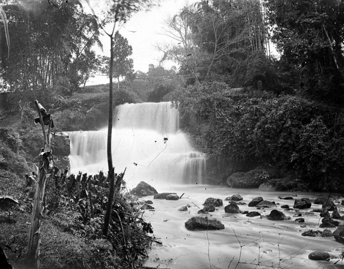 Negatief. Waterval bij Bululawang, Oost-Java